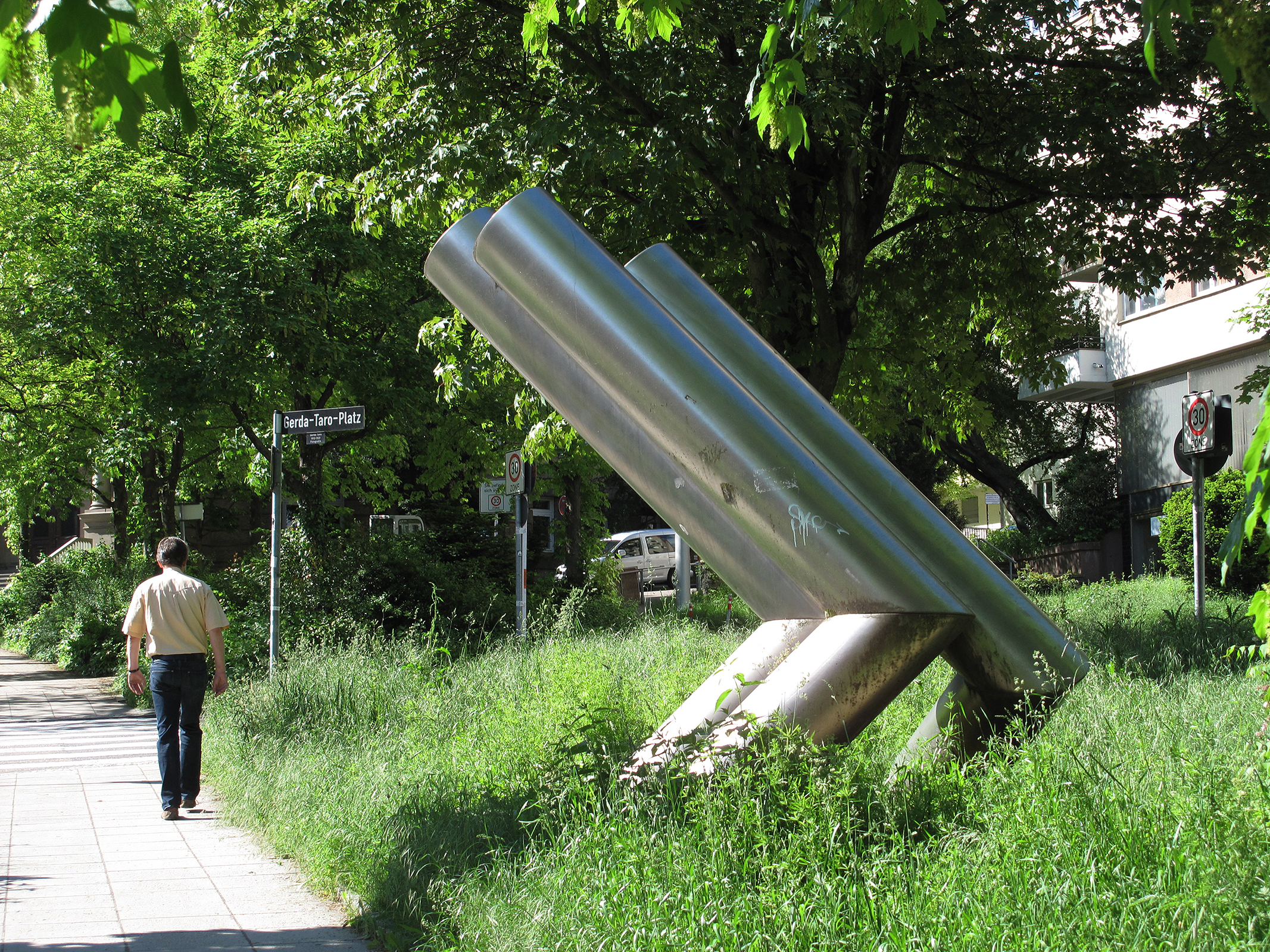 Erich Hauser, 12/72, 1972, Stuttgart-Mitte, Gerda-Taro-Platz, Hohenheimer Straße